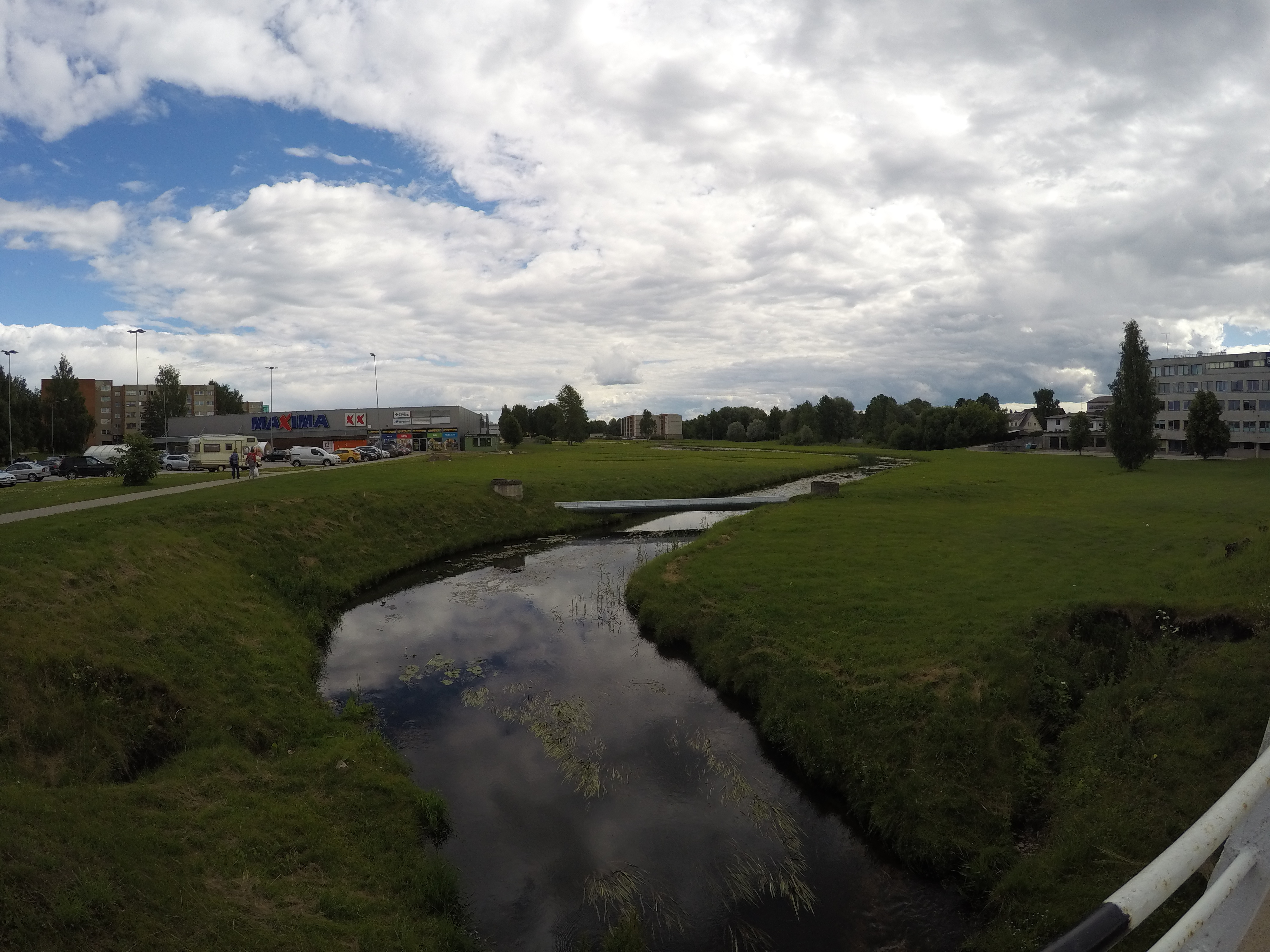 A Koreli-patak Vöru belvárosának közelében a Vabaduse tn (Szabadság út) hídjáról fotózva. Háttérben a Maxima bevásárlóközpont.